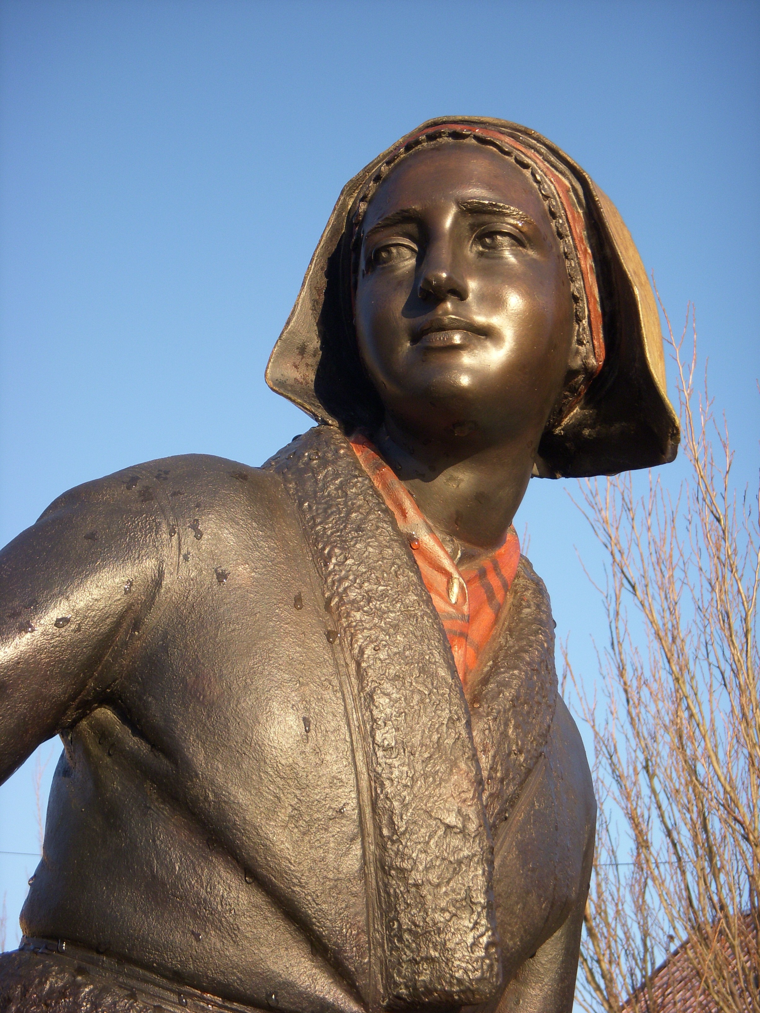 Dalkullan "Pilt-Carin", skulptur av Peter Linde 2005, finns i Järla Sjö, Nacka (detalj)